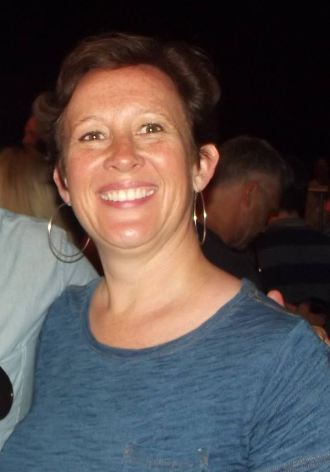 Kristina Reed au Festival international du film d'animation d'Annecy 2014